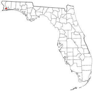 Category:Pensacola, Florida